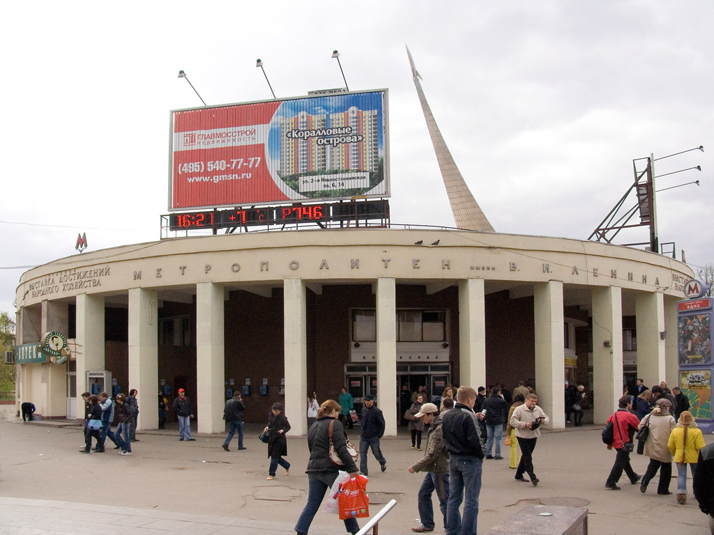 Moscow Metro station VDNKh entrance